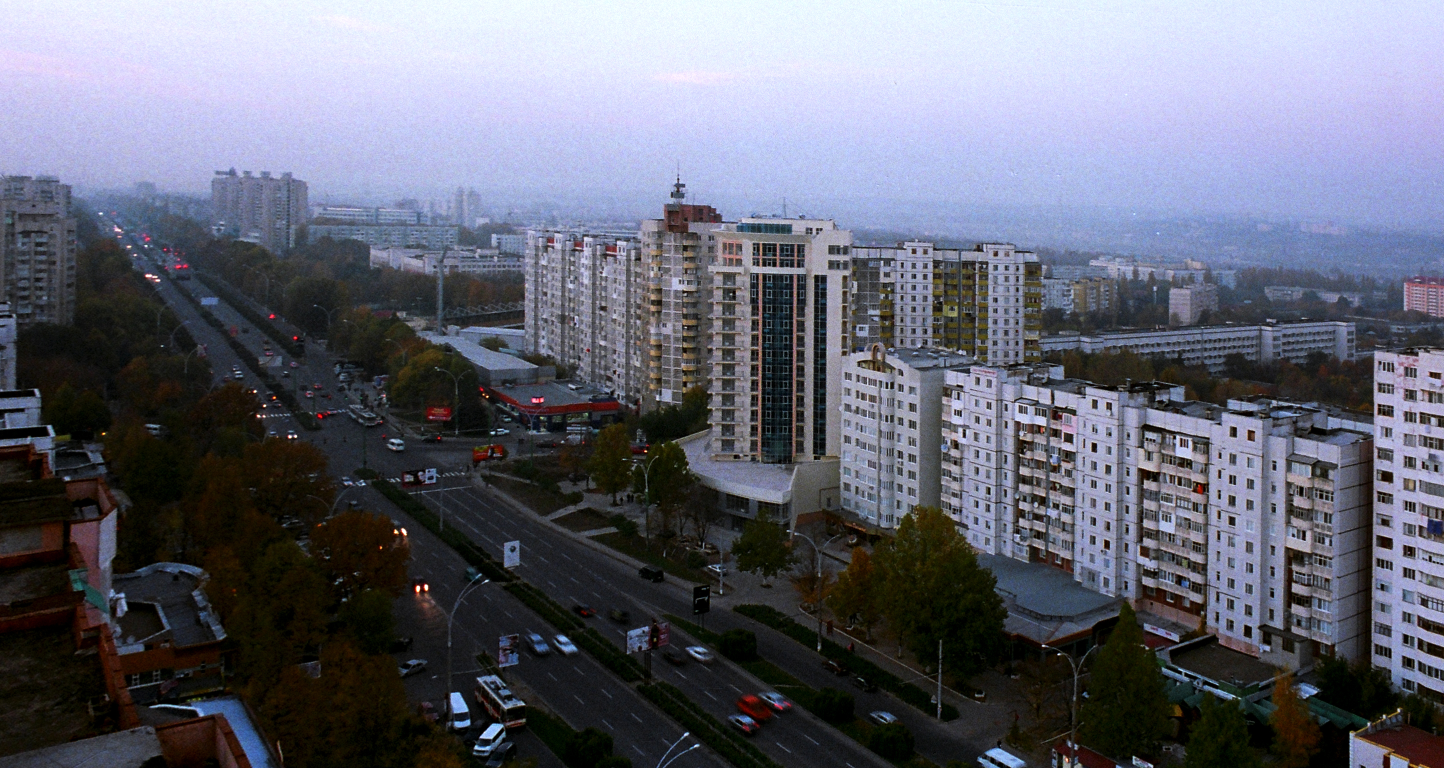 Panoramic view upon Botanica district and Dacia avenue, Chişinău, Moldova.